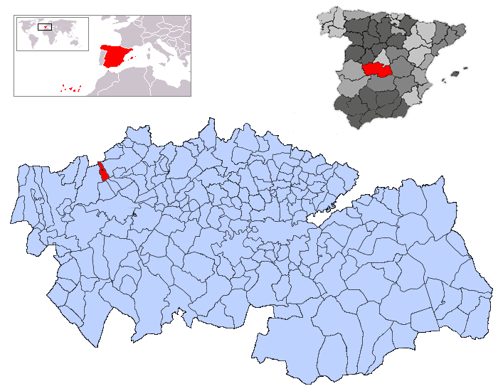 Montesclaros en la provincia de Toledo